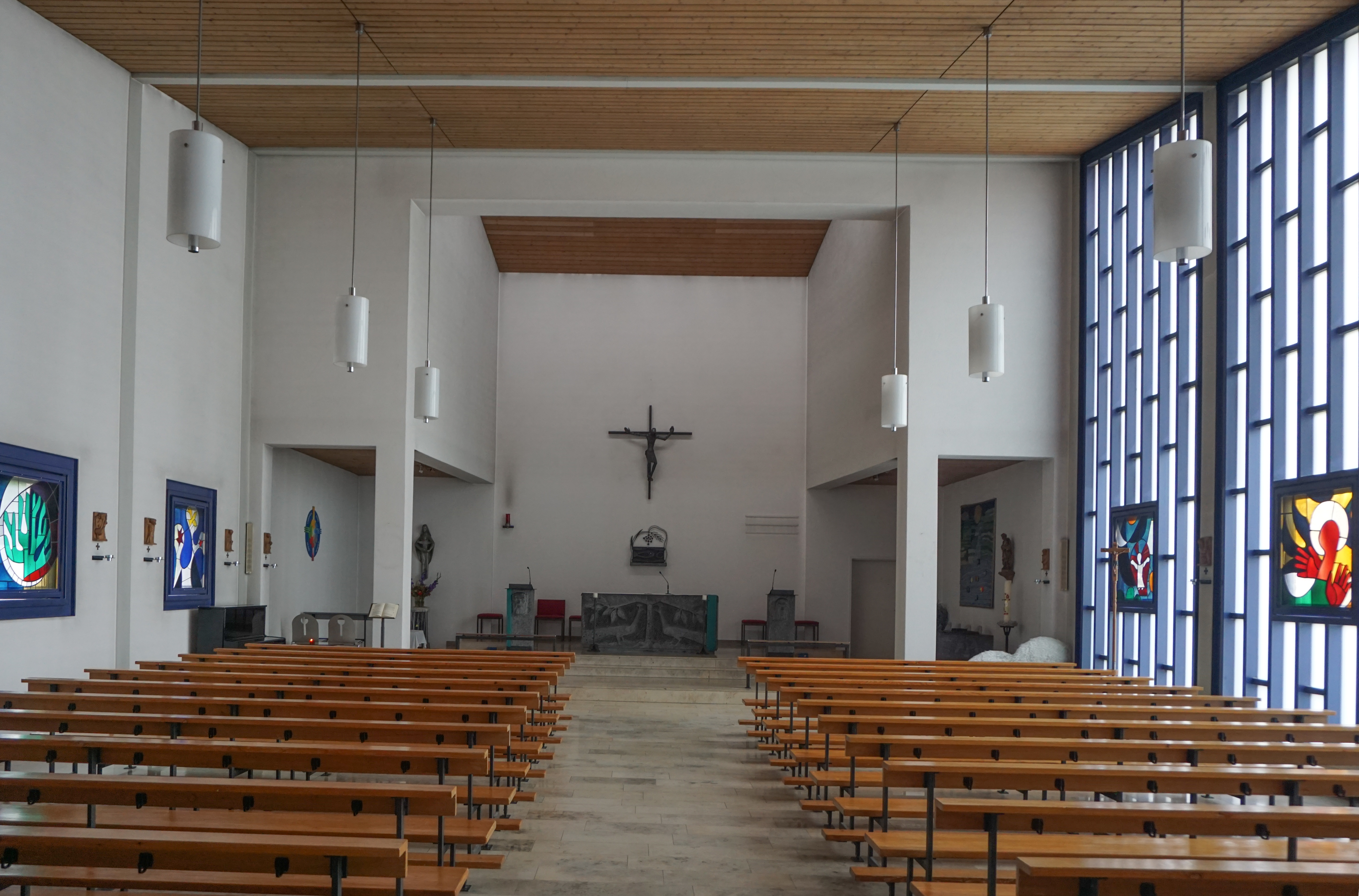 Kath. Kirche Utzenstorf Innenraum